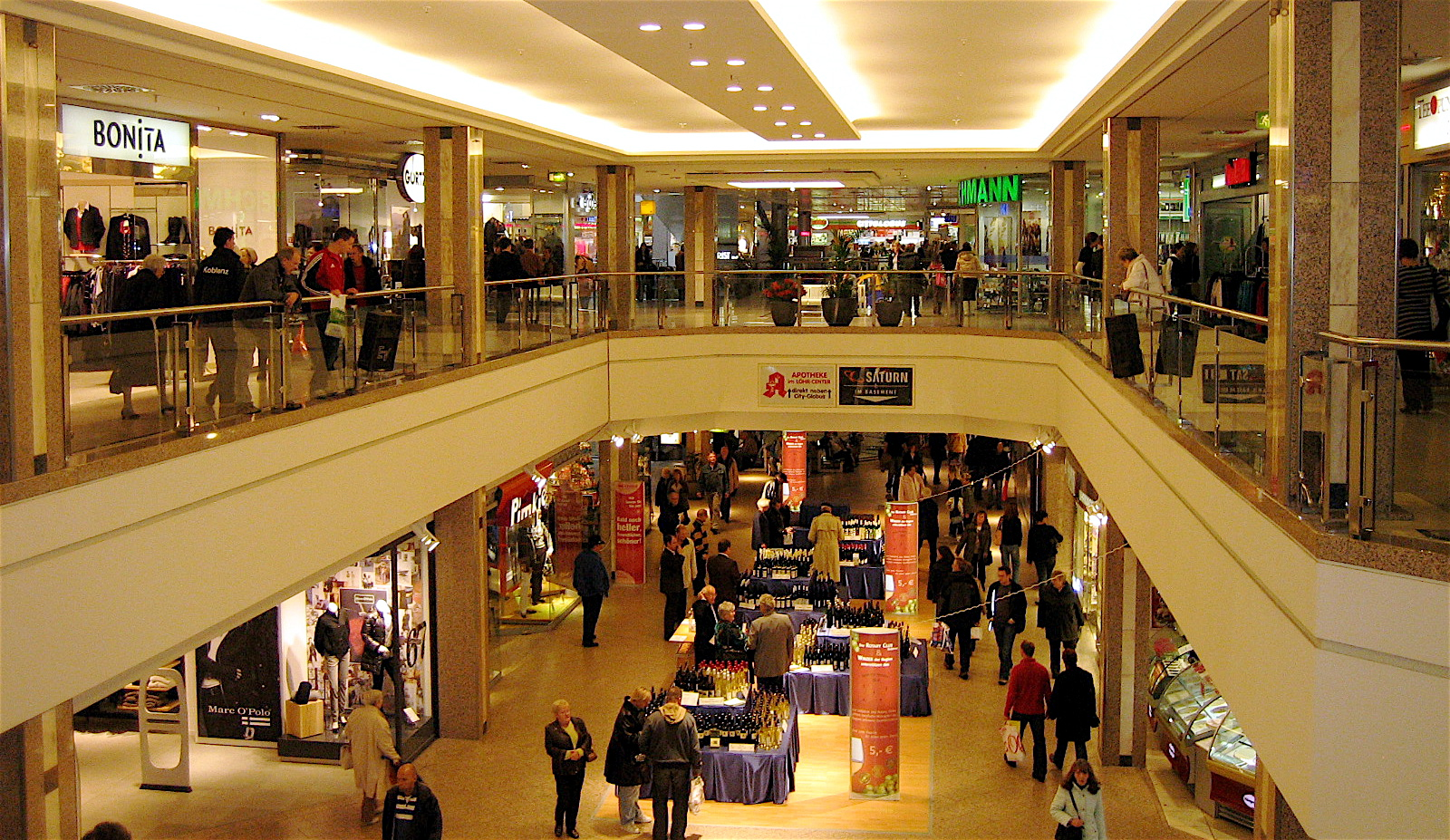 Koblenz: Löhr-Center: Interior view / Innenansicht / Vue intérieur